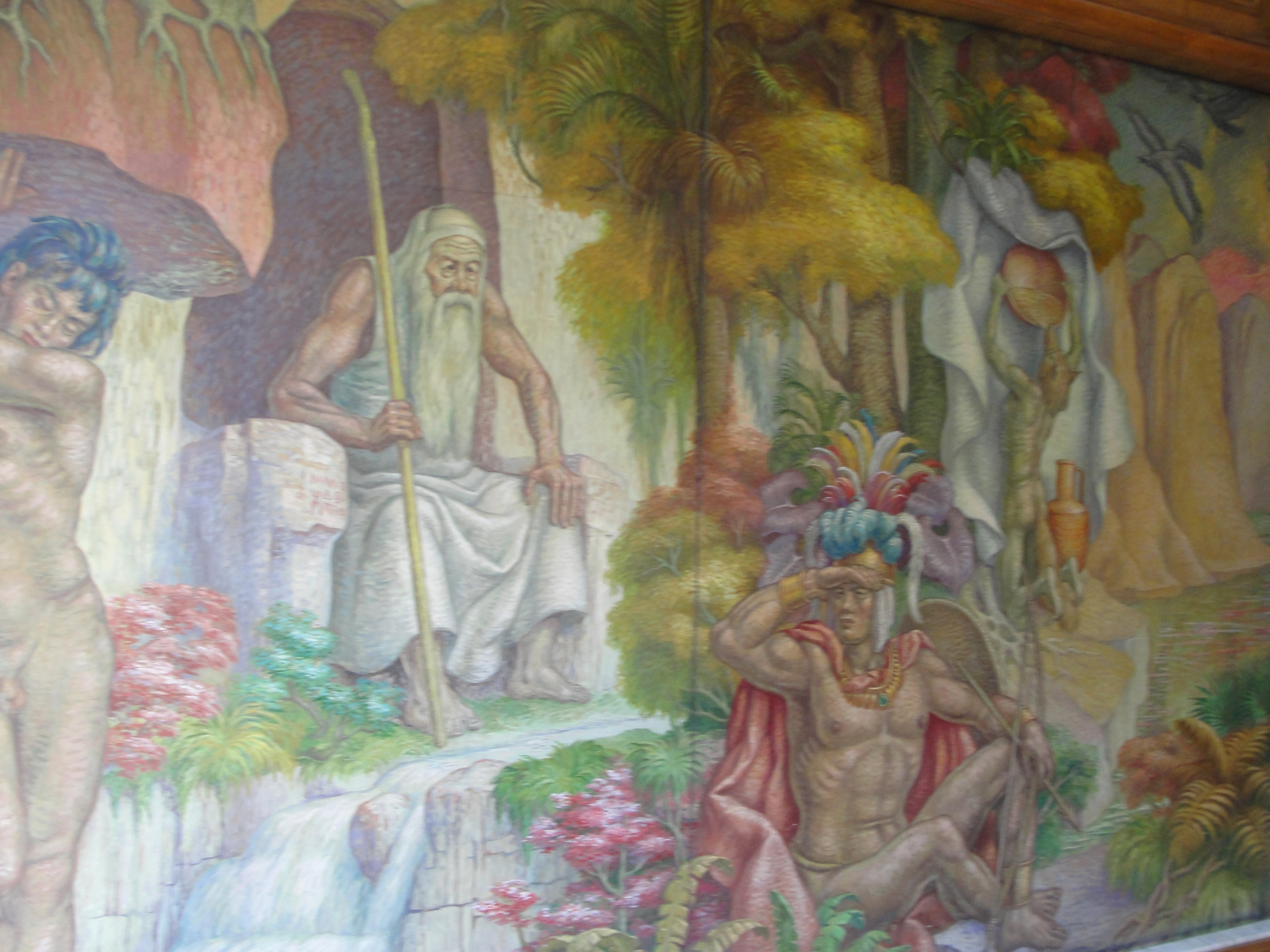 00-098 Carrera 10 26-21, Calle 26 10-70, Carrera 13 26-20